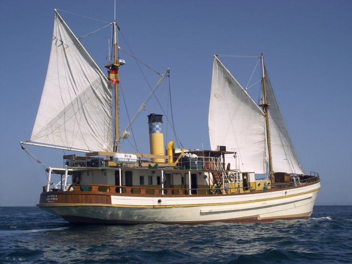 Hidria Segundo navegando con velas y motor